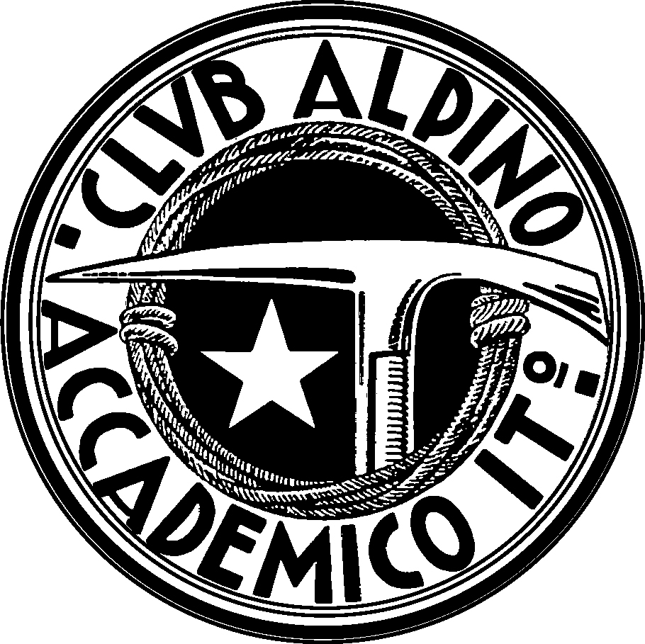 Stemma del Club Alpino Accademico Italiano